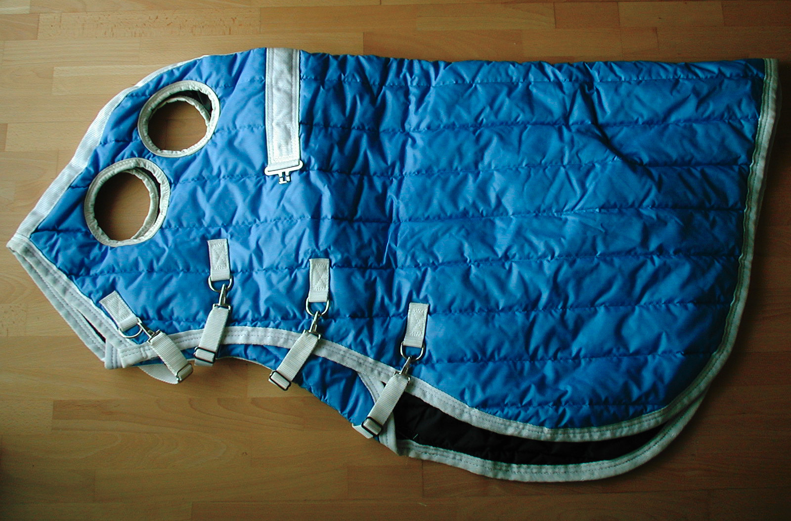 Kopfteil einer gesteppten Pferdedecke